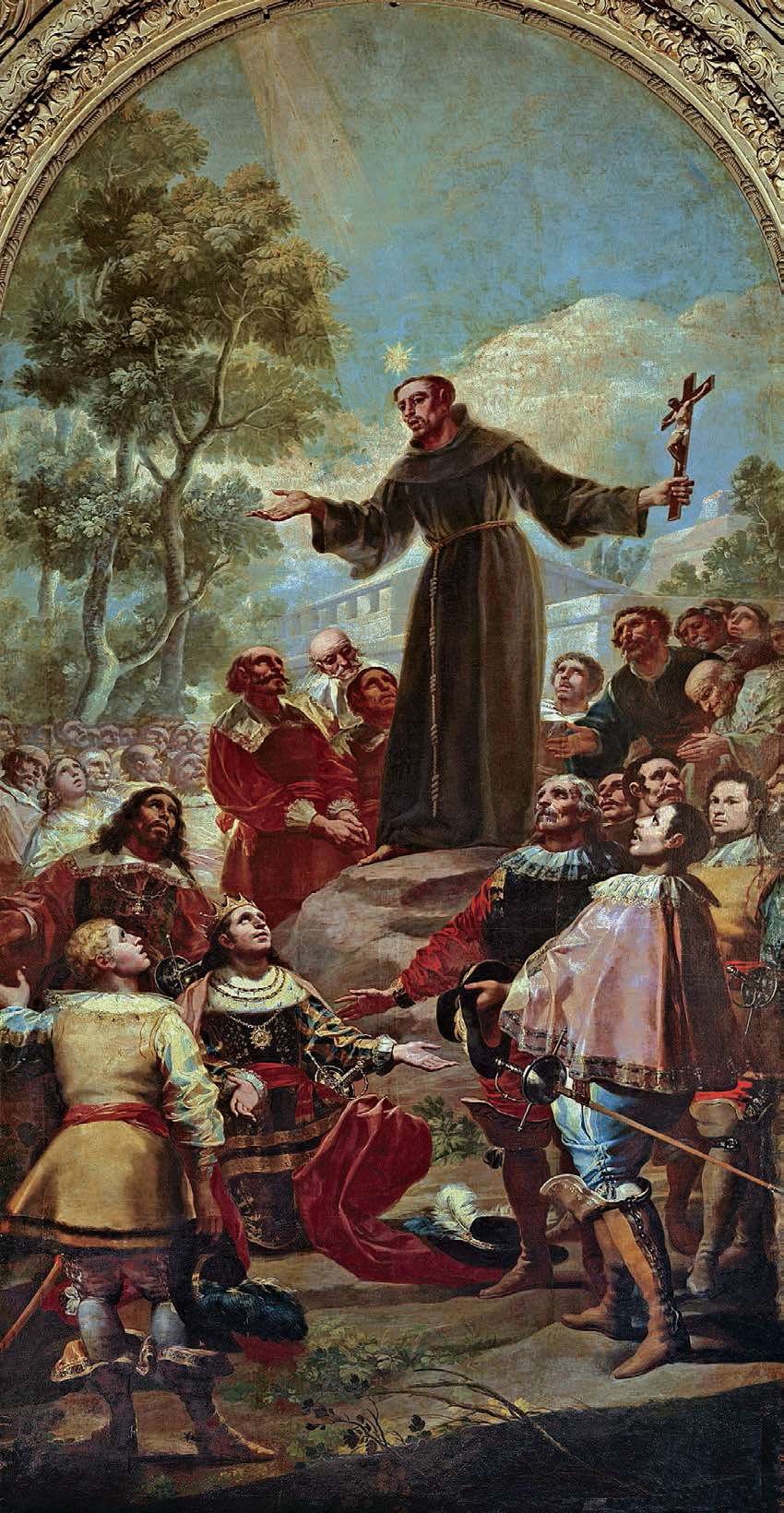 La obra muestra a San Bernardino de Siena predicando ante el rey Alfonso V de Aragón. Y el hombre joven que aparece a la derecha de la obra está considerado un autorretrato del pintor Francisco de Goya.